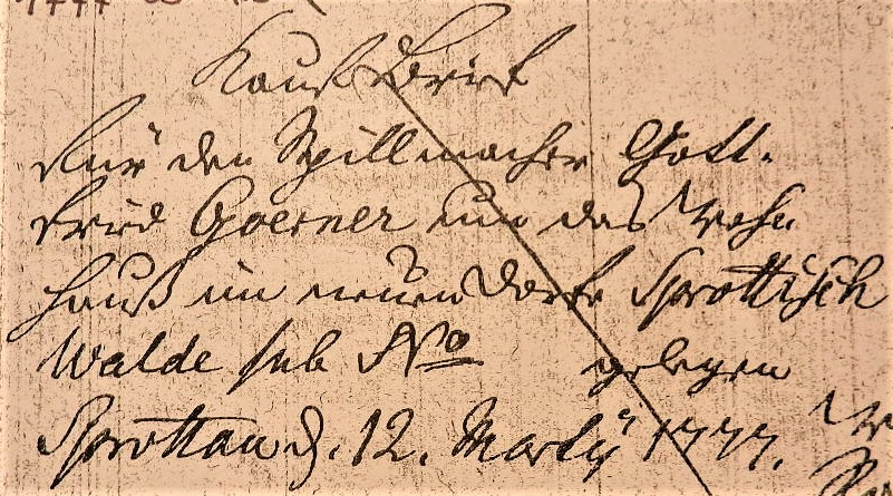 Spillmachers Gottfried Goerner kauft 1777 ein Wohnhaus in Sprottischwaldau